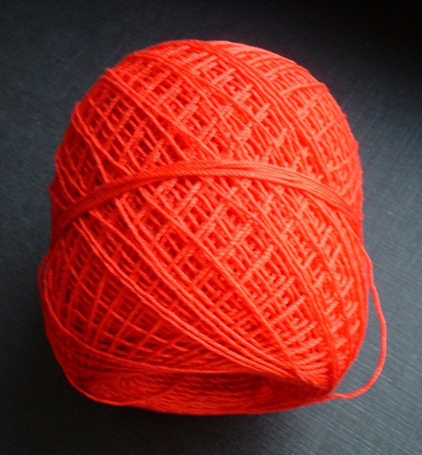 Häkelgarn (Baumwollkordonnet)